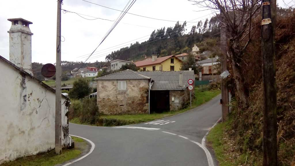 Vista de Chá, Mandiá, Ferrol.